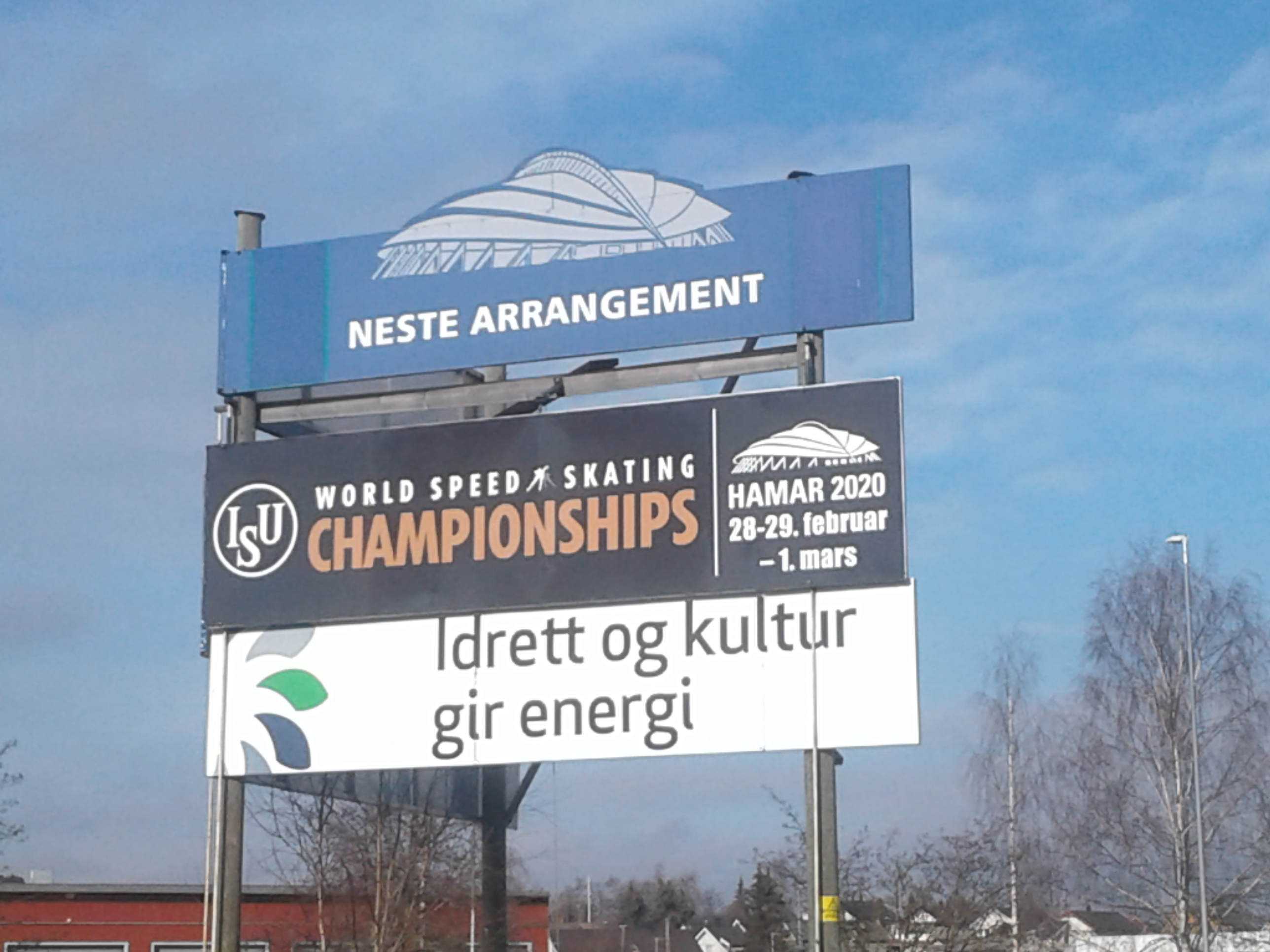 skøyte-VM 2020 Hamar